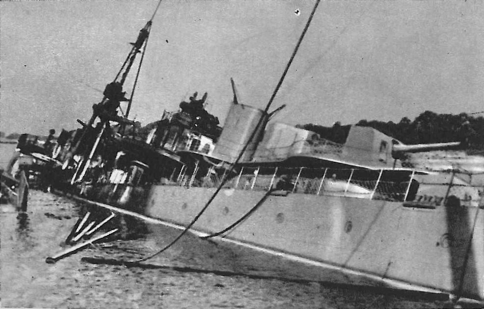 Wrak stawiacz min ORP "Gryf", zatopionego 3 września 1939 r. w porcie helskim.